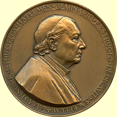 1925. Heemstede. Inwijding kapel nieuwgebouwde Klein Seminarie Hageveld. Vz. borstbeeld van Aug. Jos. Callier. Kz. gezicht in vogelvlucht op het seminarie. Brons 80 mm. Vervaardigd bij de Stichtsche Fabriek van Zilverwerken, Utrecht